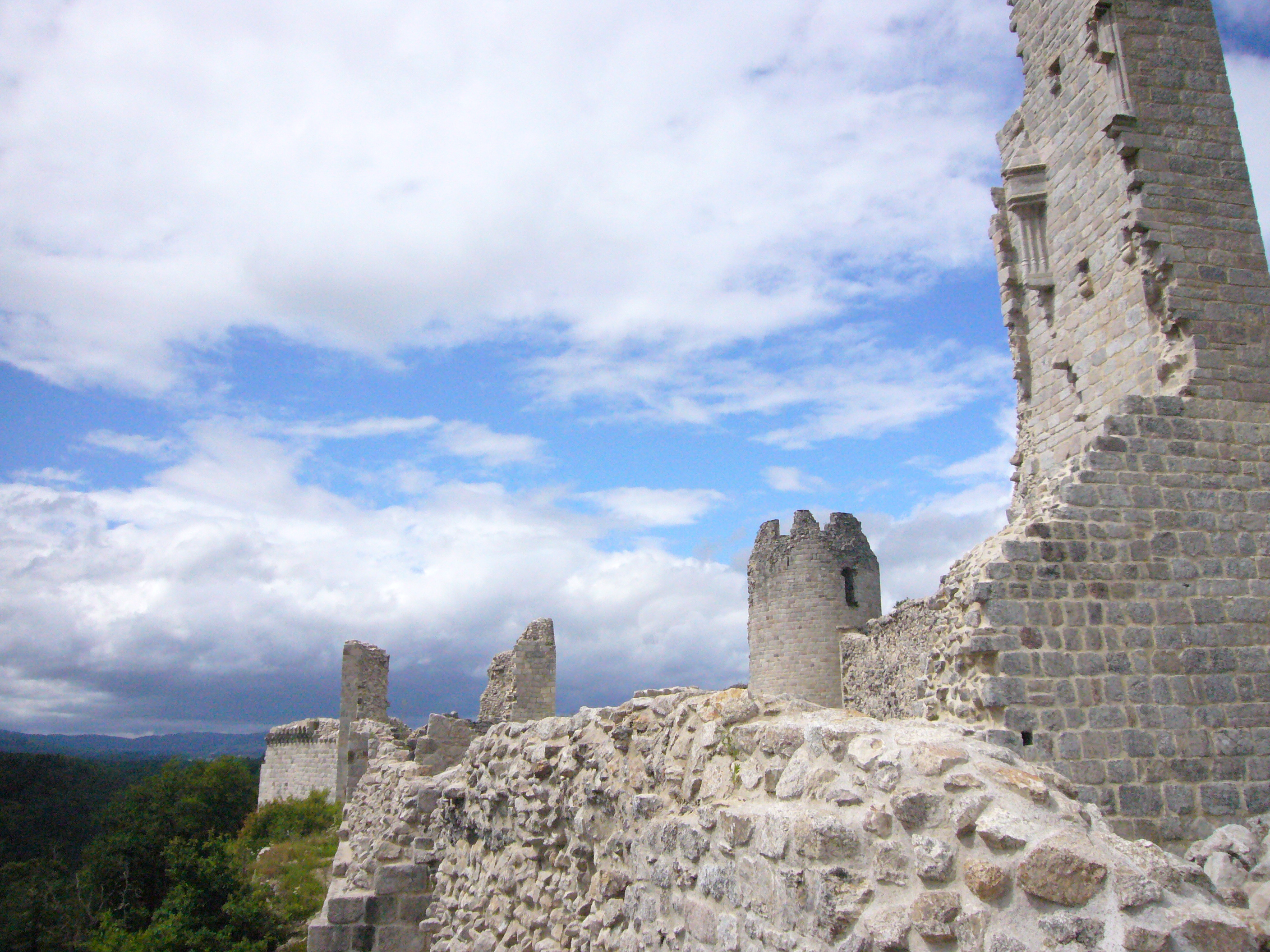 Château de Ventadour (Moustier-Ventadour, Corrèze, France) It is indexed in the Base Mérimée, a database of architectural heritage maintained by the French Ministry of Culture, under the references PA00099811 and IA00030480.